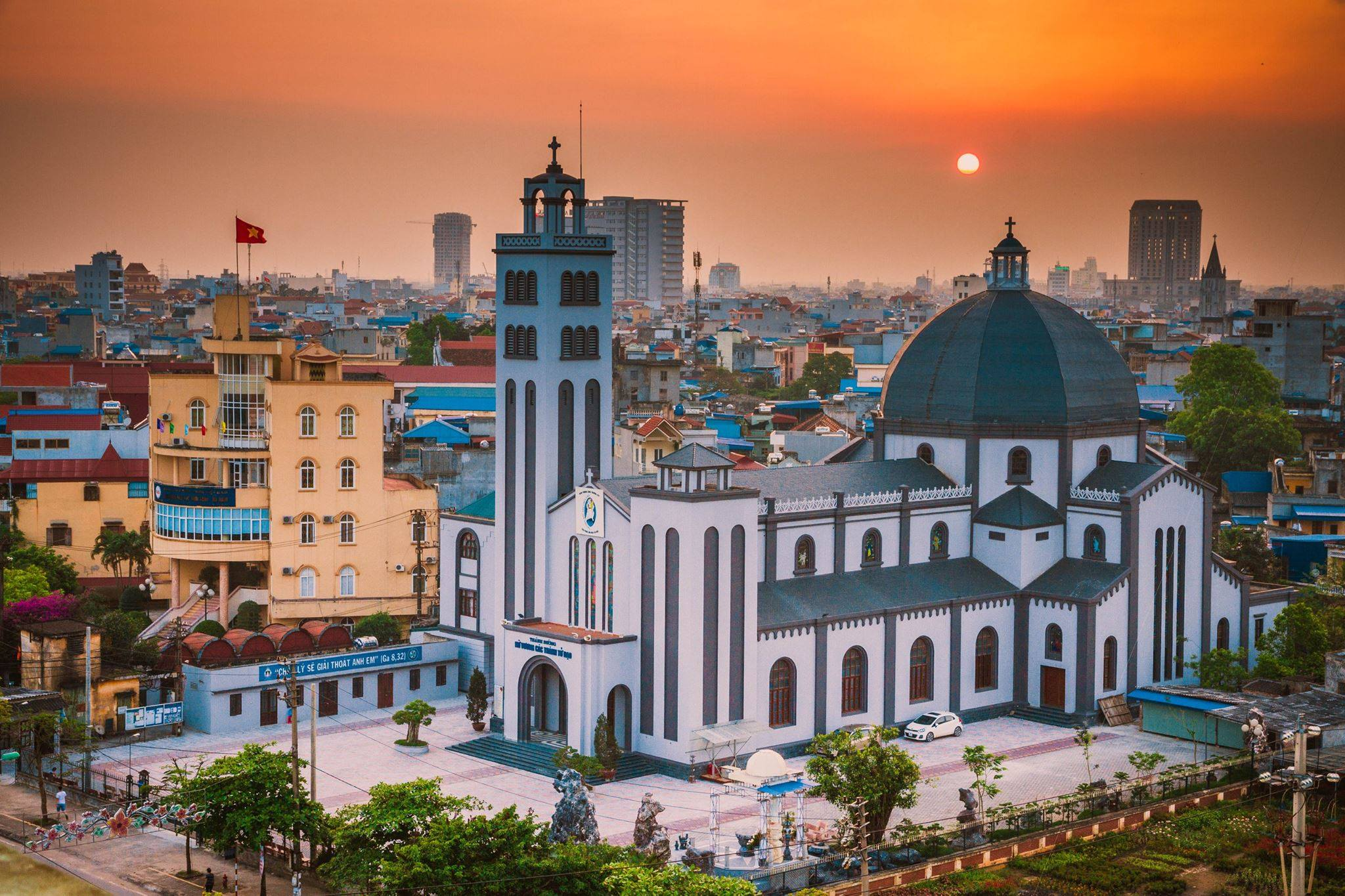 Bản quyền thuộc về facebook Nam Định trong tim tôi